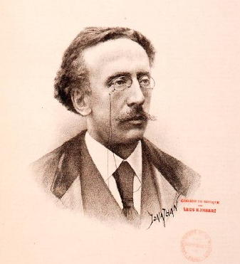 Joseph Dupont (1838-1899), chef d'orchestre (c. 1885)